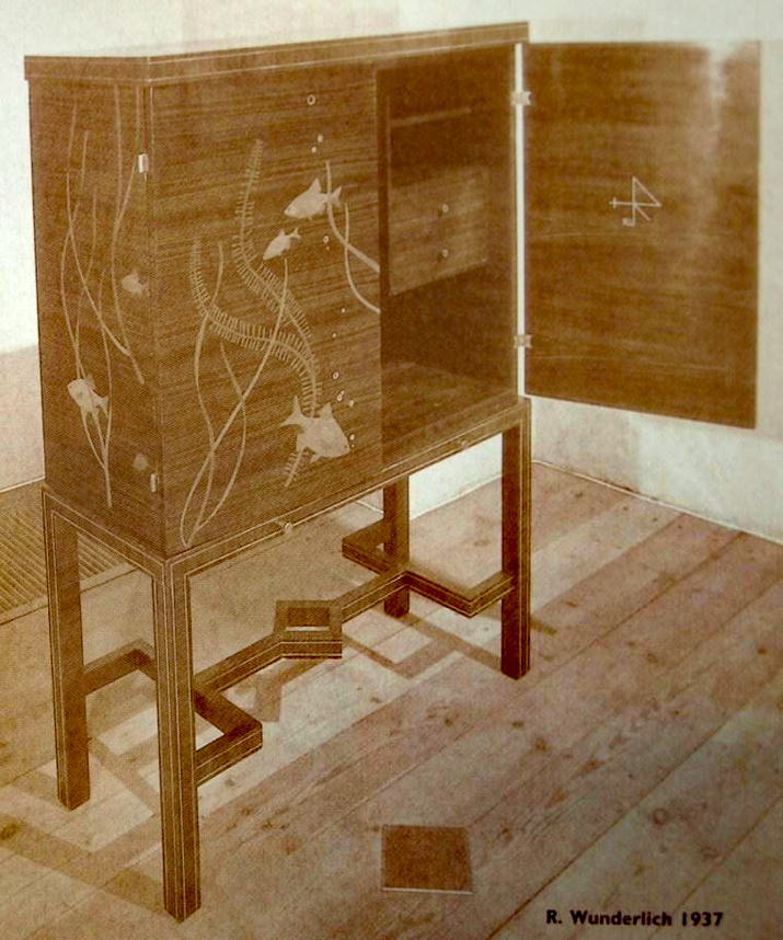 kapp